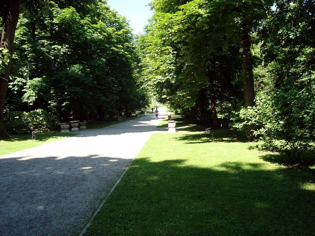 Poarta sărutului din municipiul Târgu Jiu, Bd. Brâncuşi Constantin, Grădina Publică, construită în anii 1937-1938 02